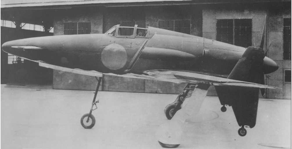 Kyushu J7W1 Shinden